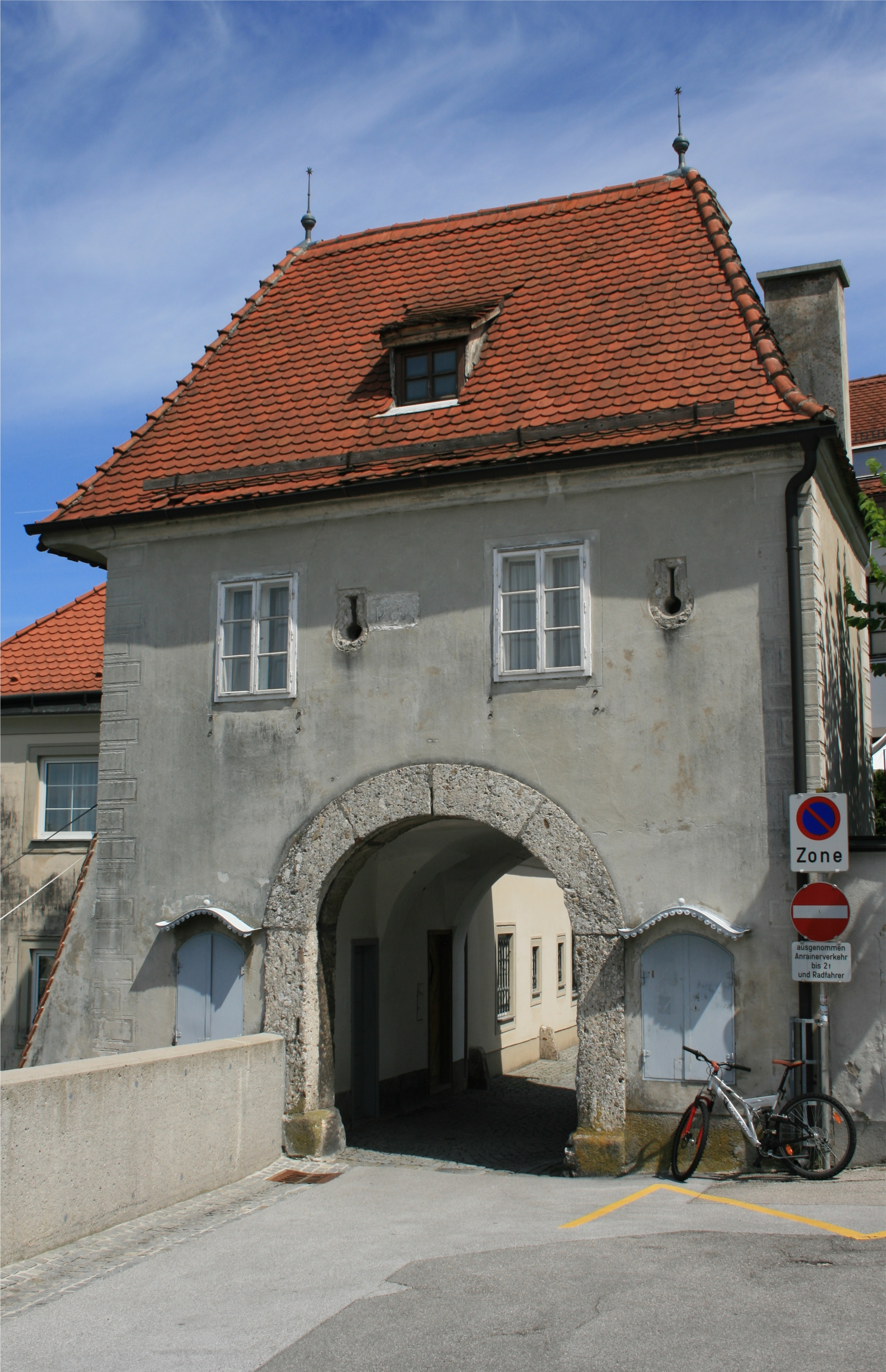 Das Kollertor im Steyrer Stadtteil Ennsdorf